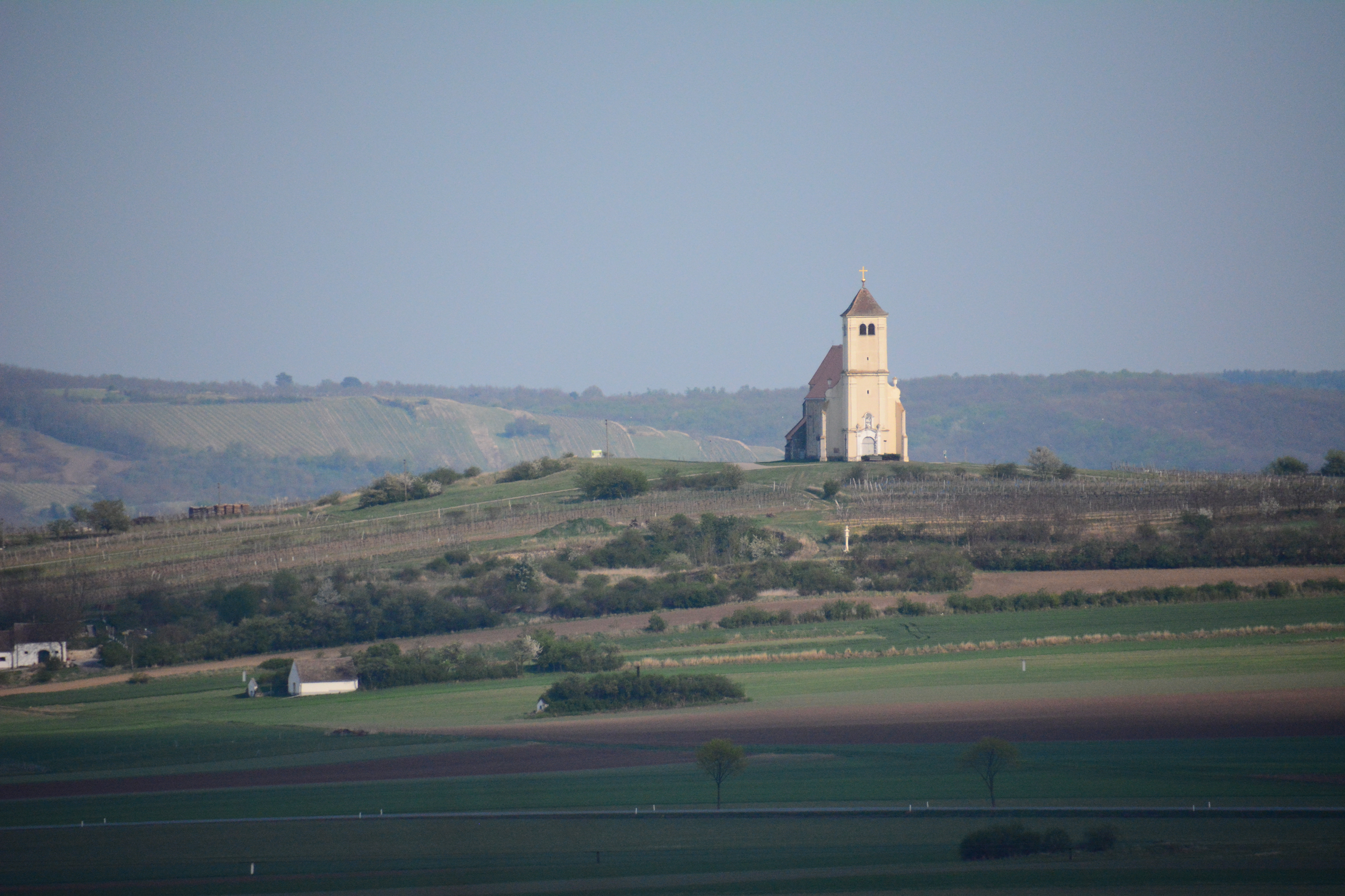 Kath. Pfarrkirche hl. Leonhard